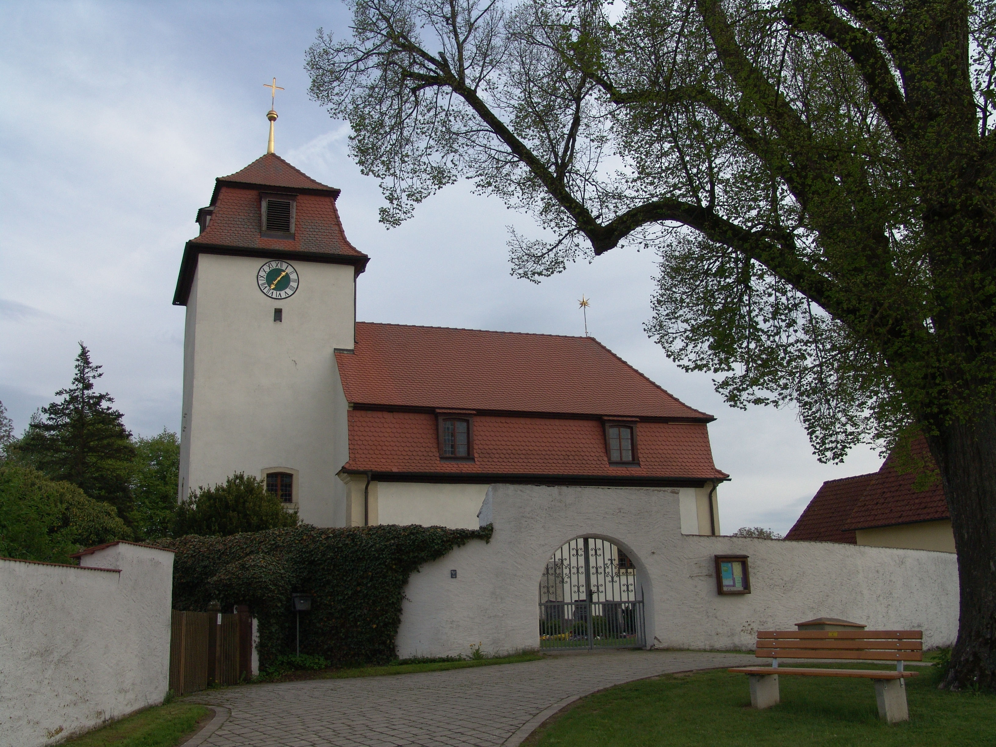 evang.-luth. Kirche St. Michael in Obermichelbach